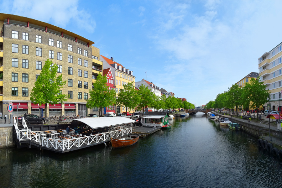 Christianshavns Kanal, København, Danmark.